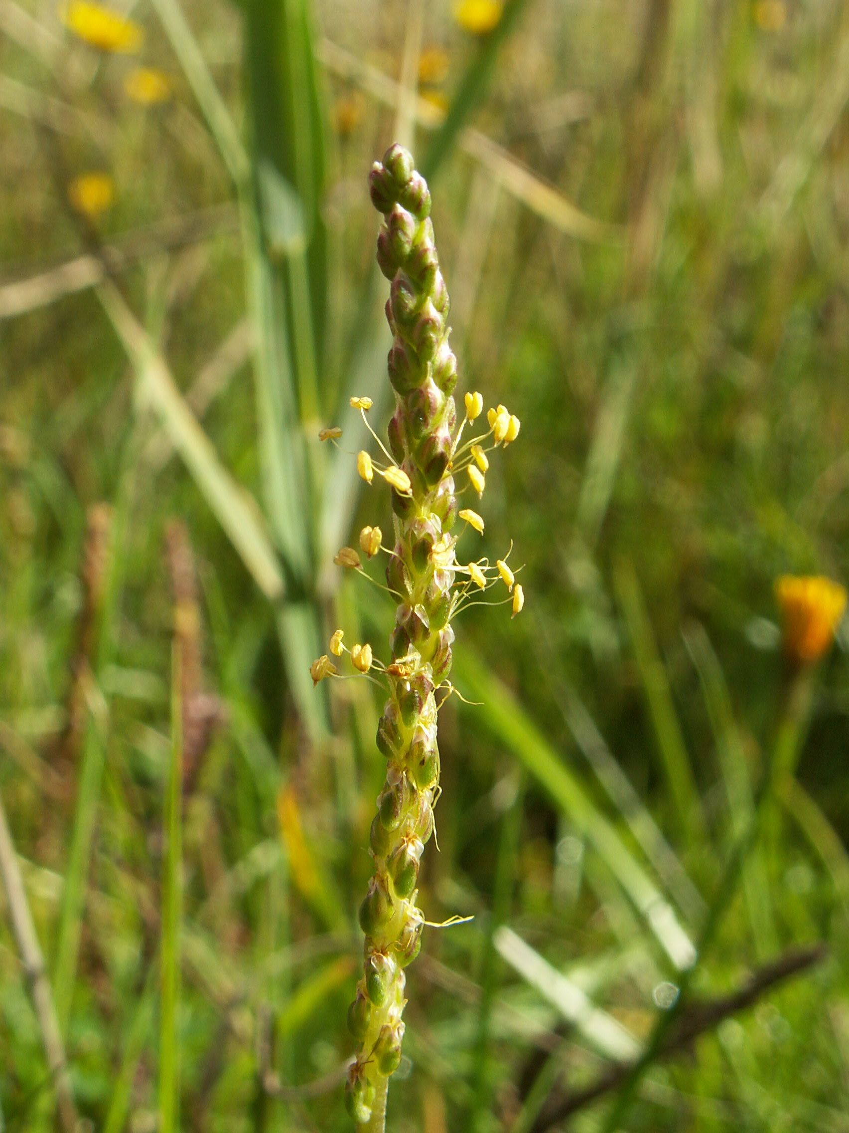 Plantago maritima, inflorescence. Chrząszczewo NW Poland